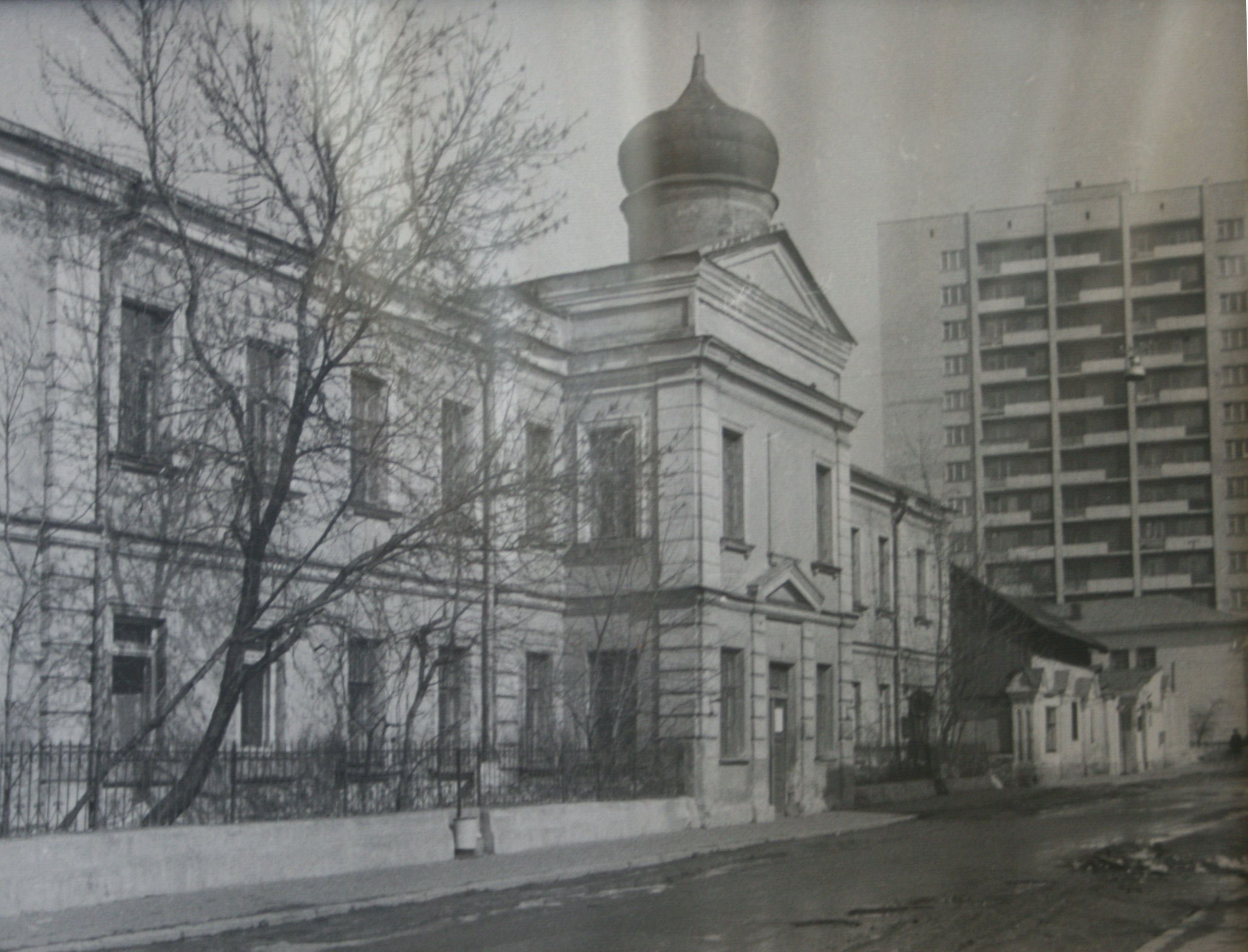 Фото страого здания библиотеки им. А.С. Грибоедова, Больничный пер., д. 7